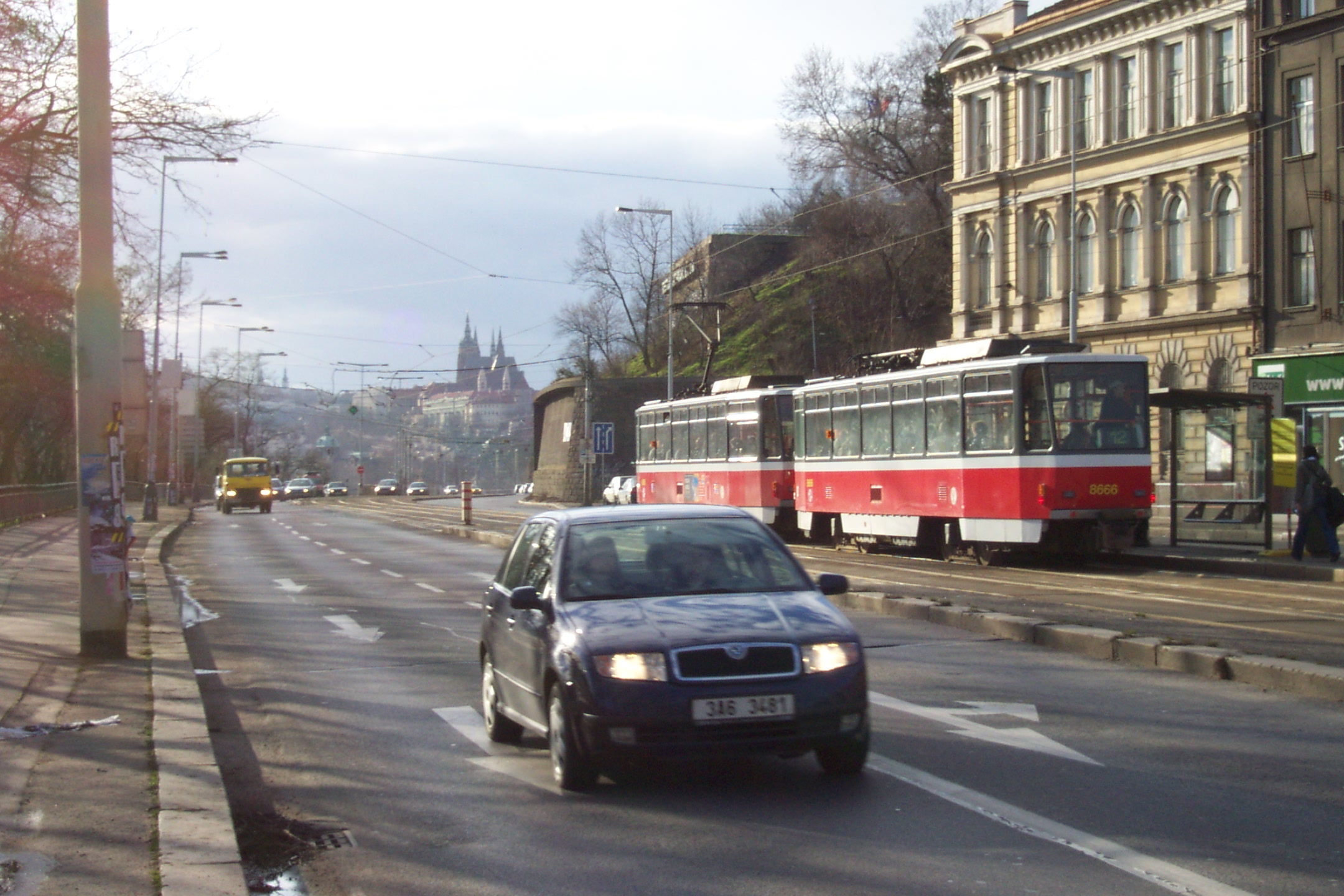 Nábřeží kapitána Jaroše v Praze, v pozadí Pražský hrad - Embankement of Kapitán Jaroš, Prague castle in the distance